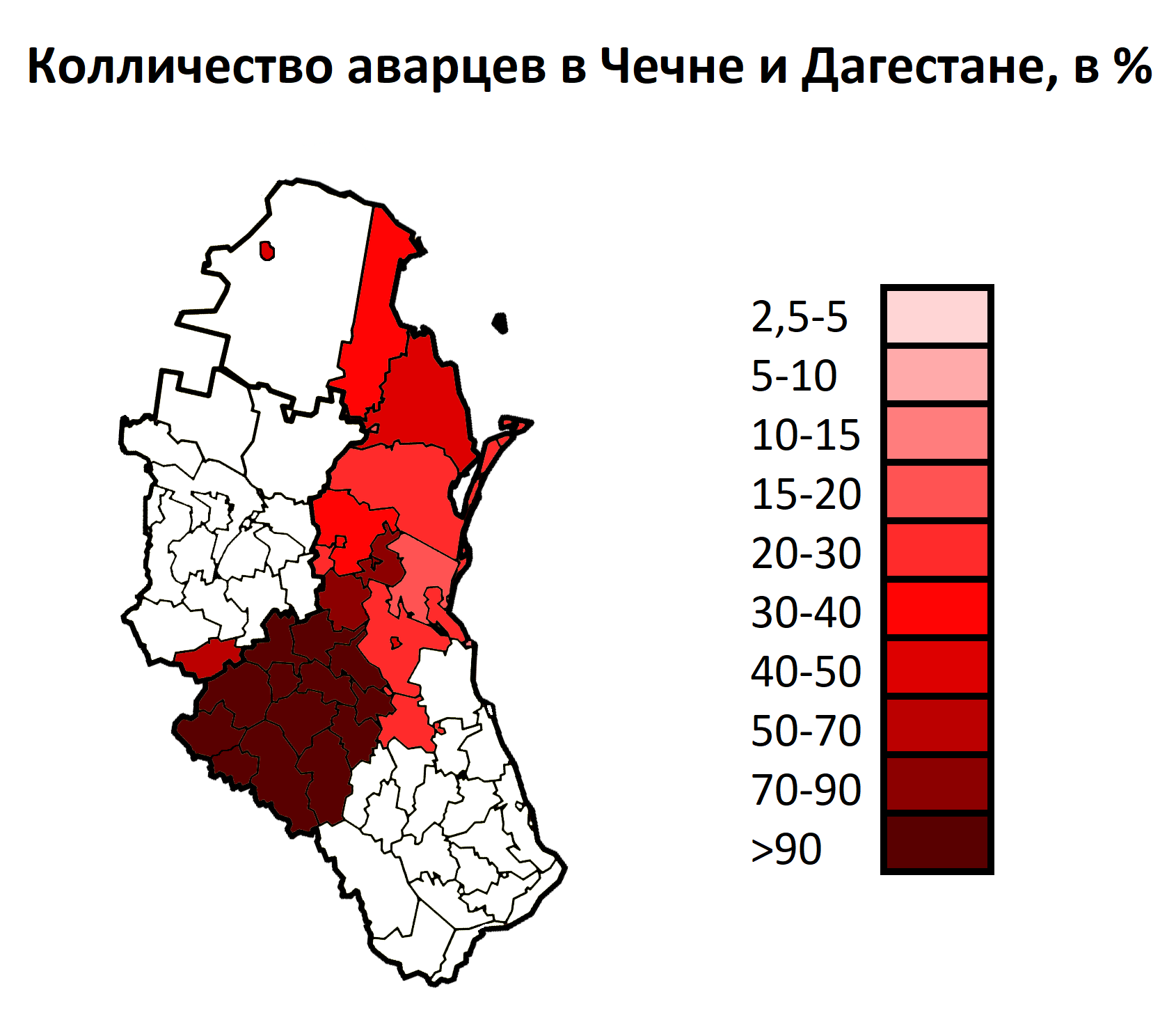 Количество аварцев в Чечне и Дагестане по муниципалитетам